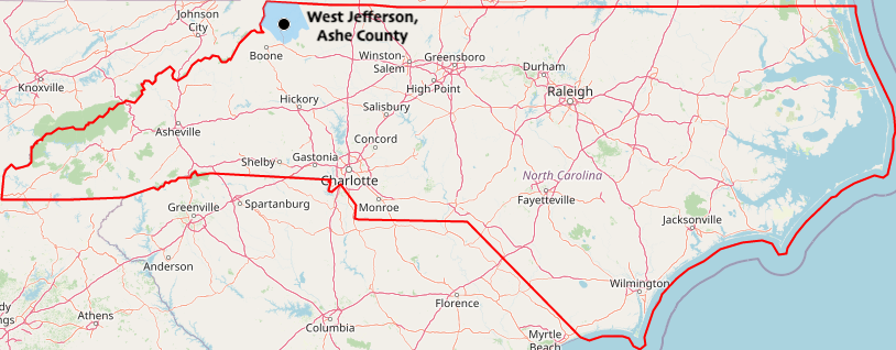 carte réalisée sur umap This map may be incomplete, and may contain errors. Don't rely solely on it for navigation.